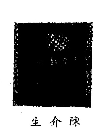 中文（中国大陆）: 制憲國民大會代表